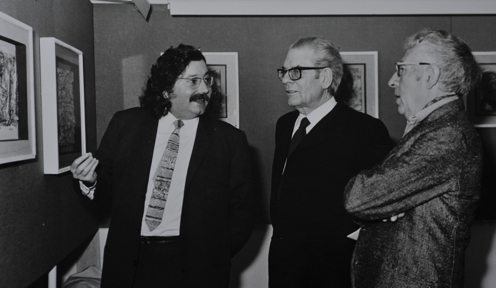 Brajo Fuso (al centro) con Pierre Restany (a sinistra) ed André Verdet (a destra)